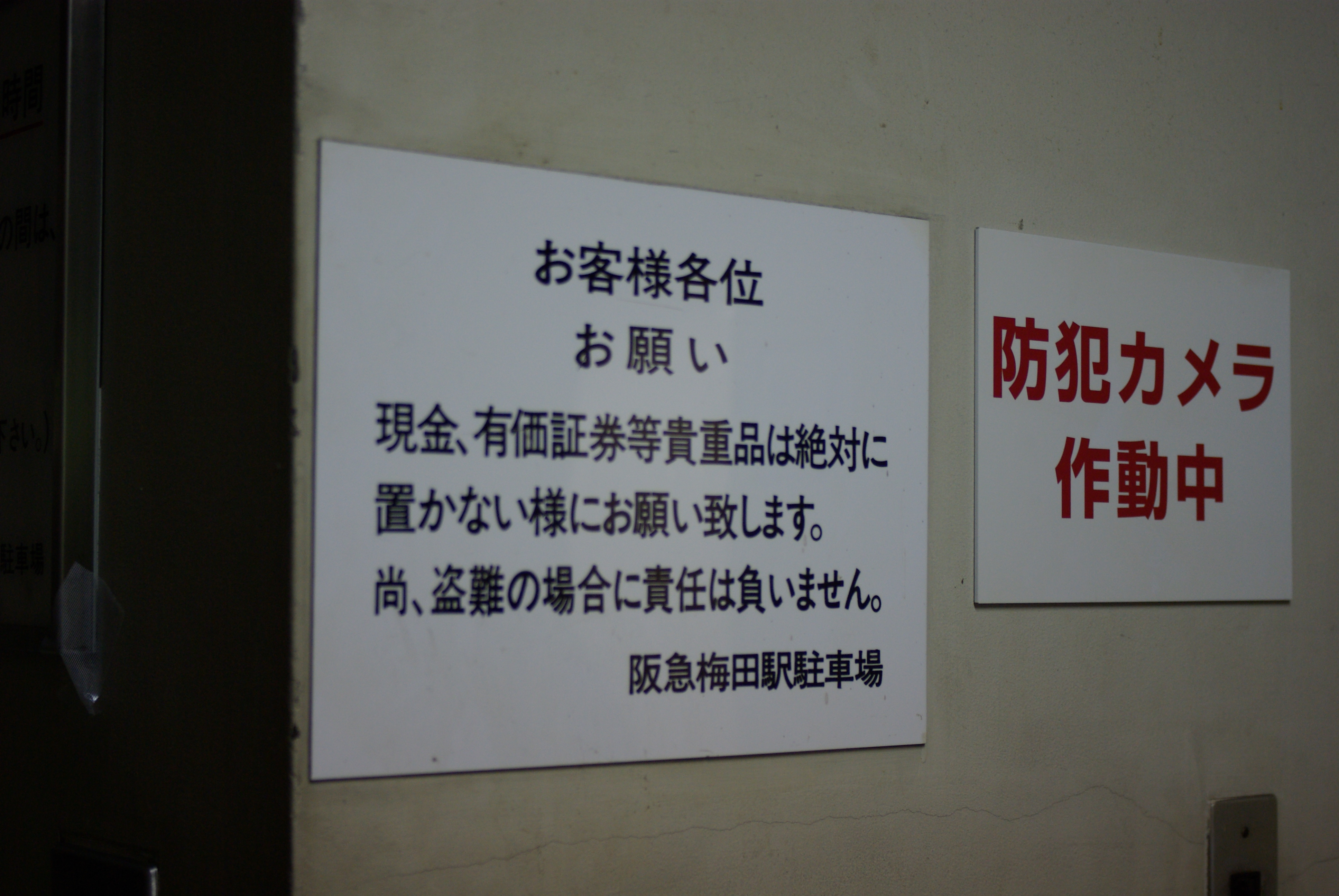 「現金、有価証券等貴重品」